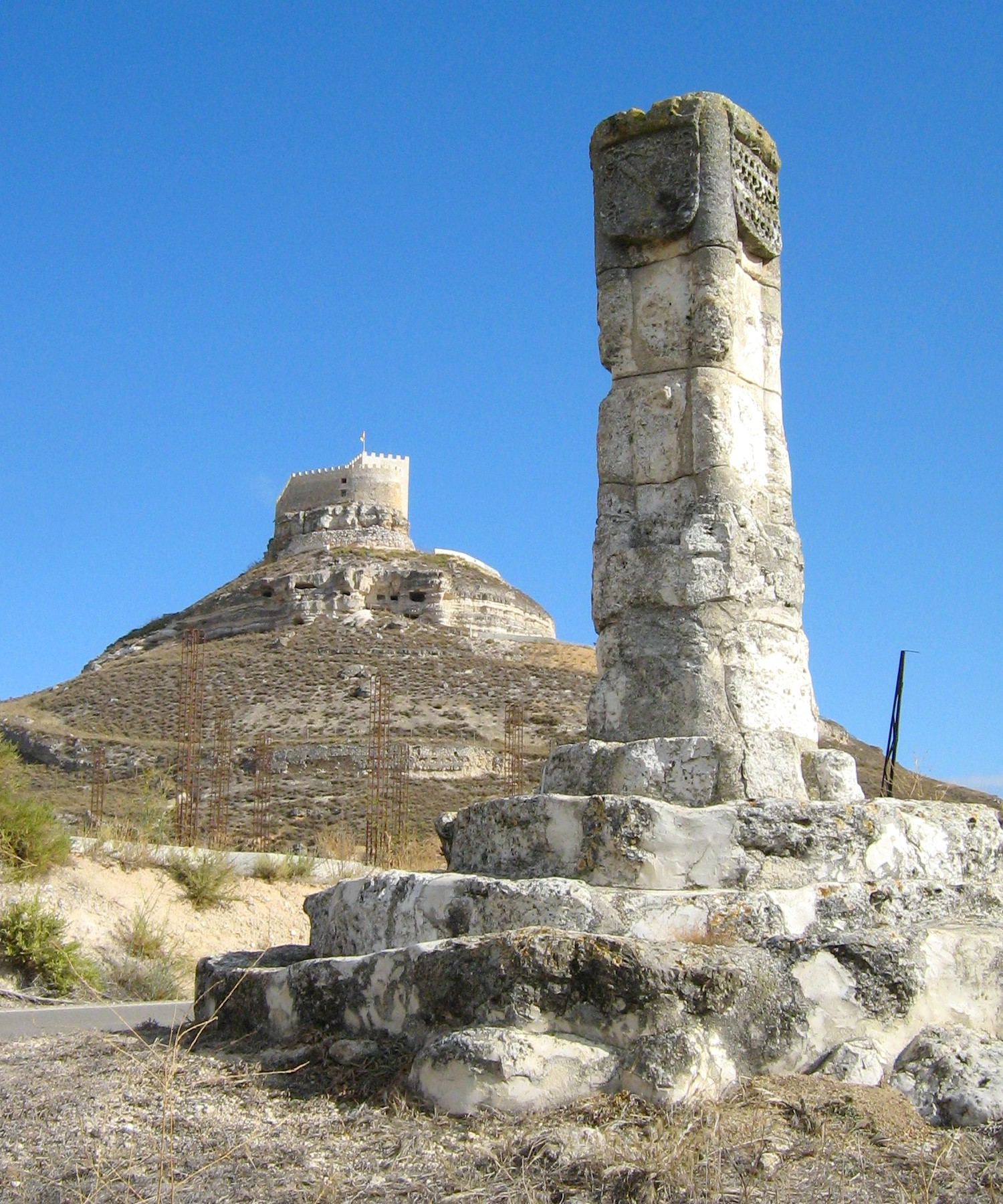 Curiel de Duero. Rollo de Justicia. Escudo de Zúñiga. Castillo. Valle del Cuco. Valladolid